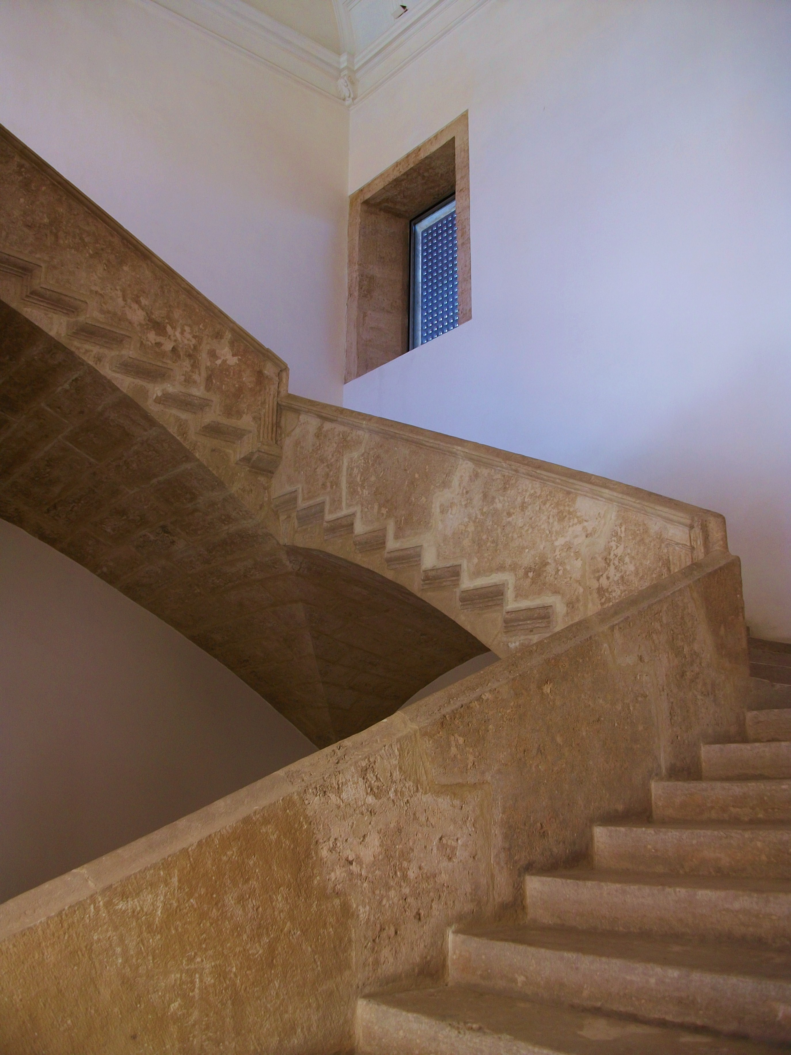 Escala del monestir de sant Miquel dels Reis de València.